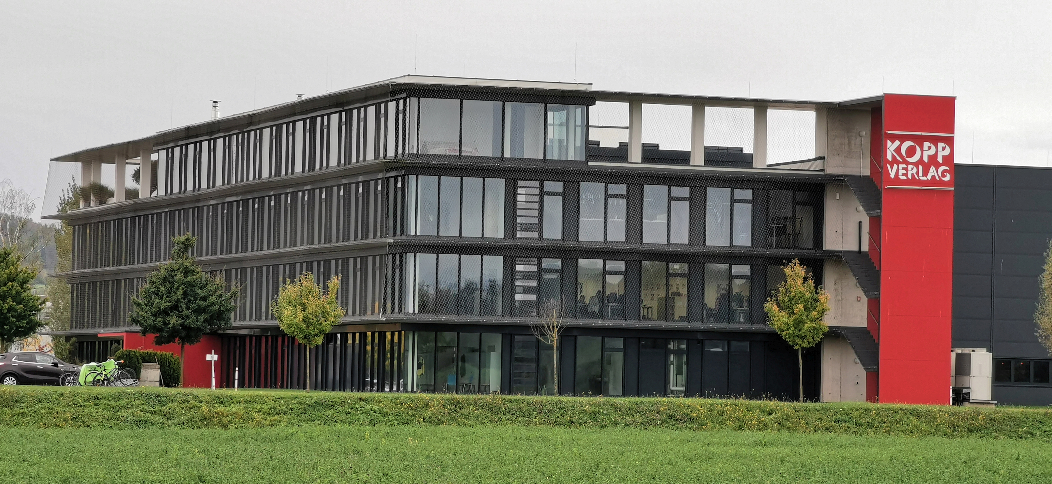 Rottenburg am Neckar 2019